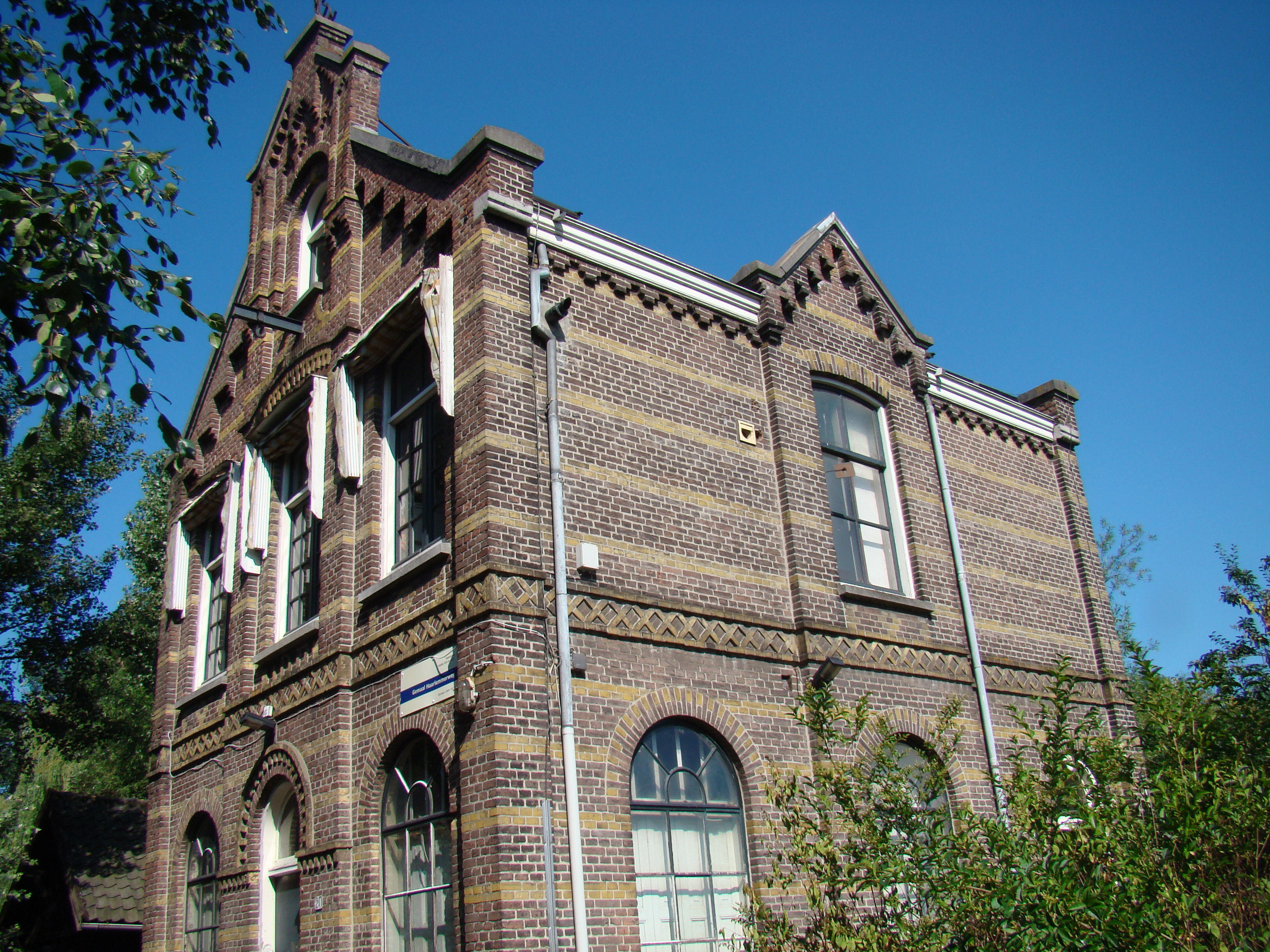 Rijksmonumenten in Westerpark